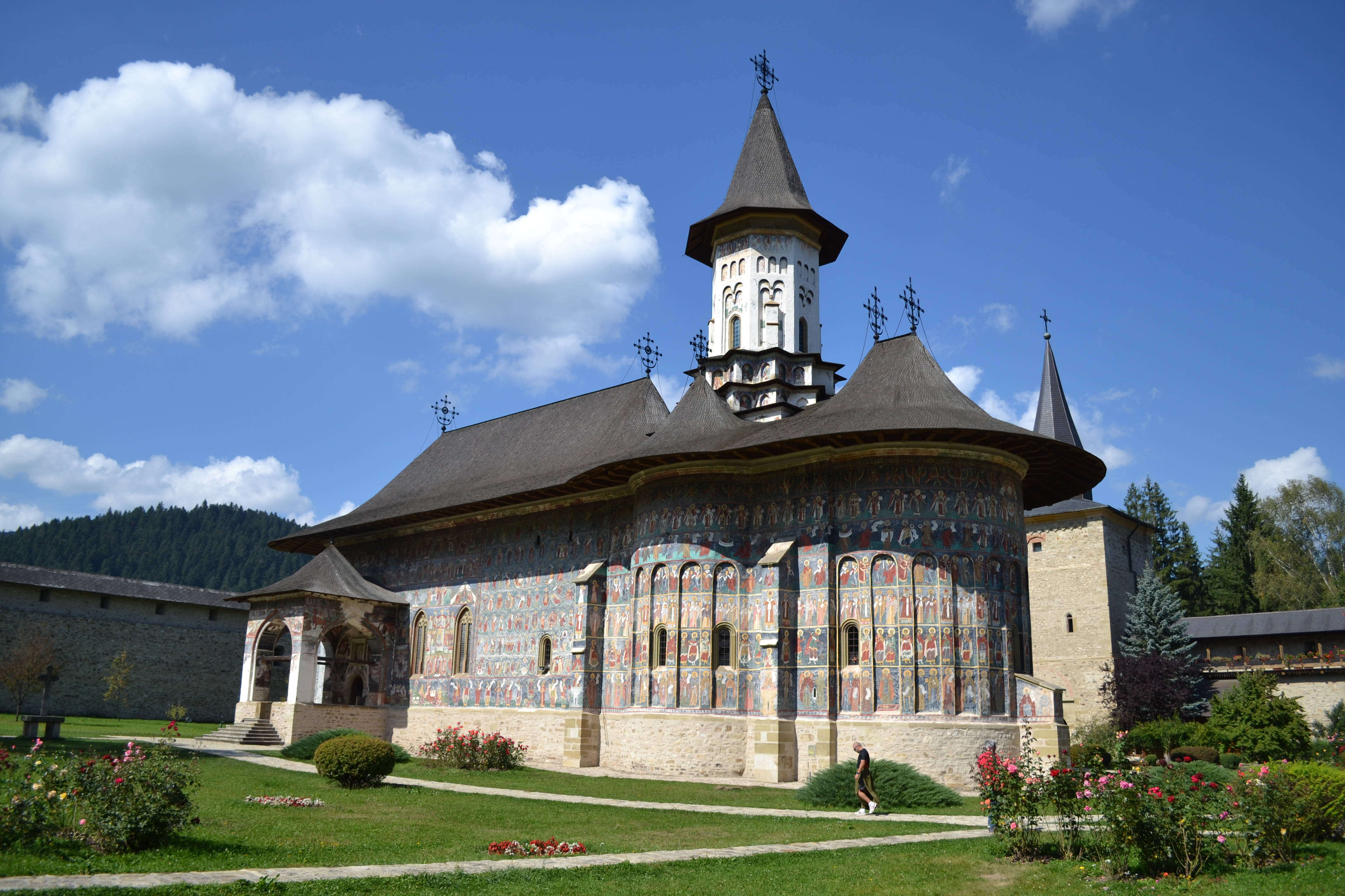 Biserica din incinta Manastirii Sucevita